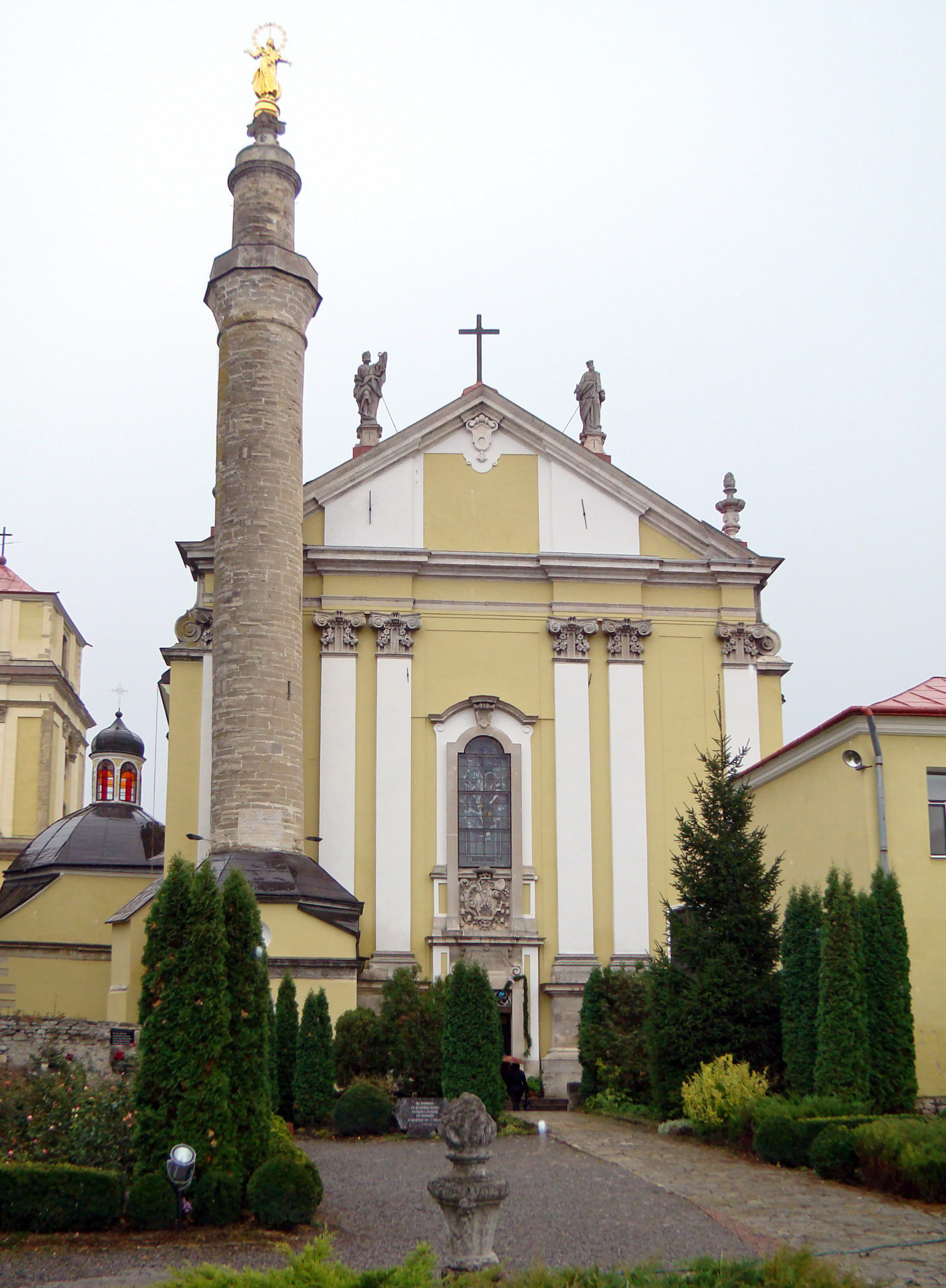 Катедра в Кам'янці-Подільському